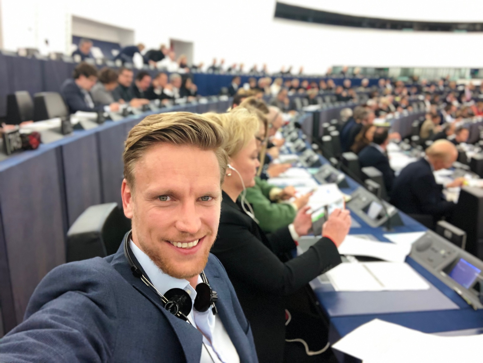 VVD politicus Jan Huitema in plenaire zaal Europees parlement